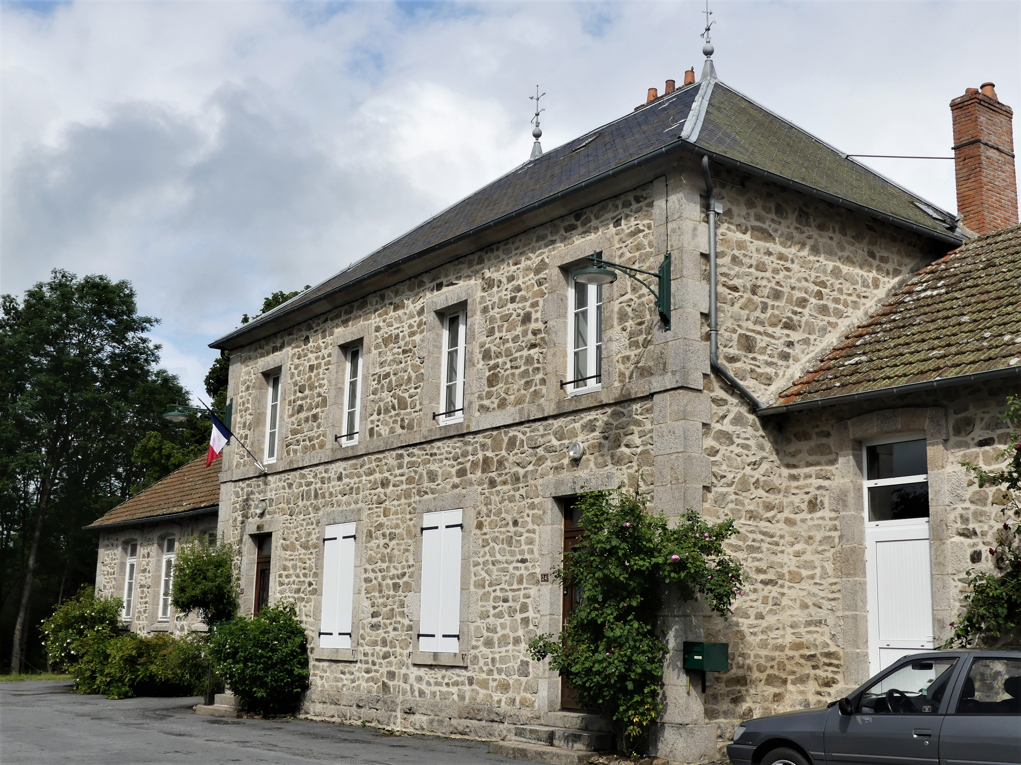 La mairie de Clairavaux, Creuse, France.